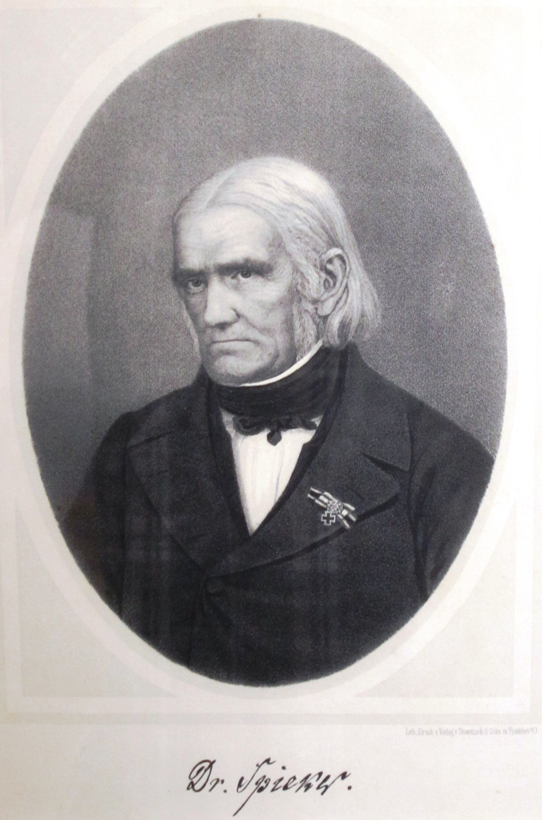 Bildnis Christian Wilhelm Spieker (1780–1858)